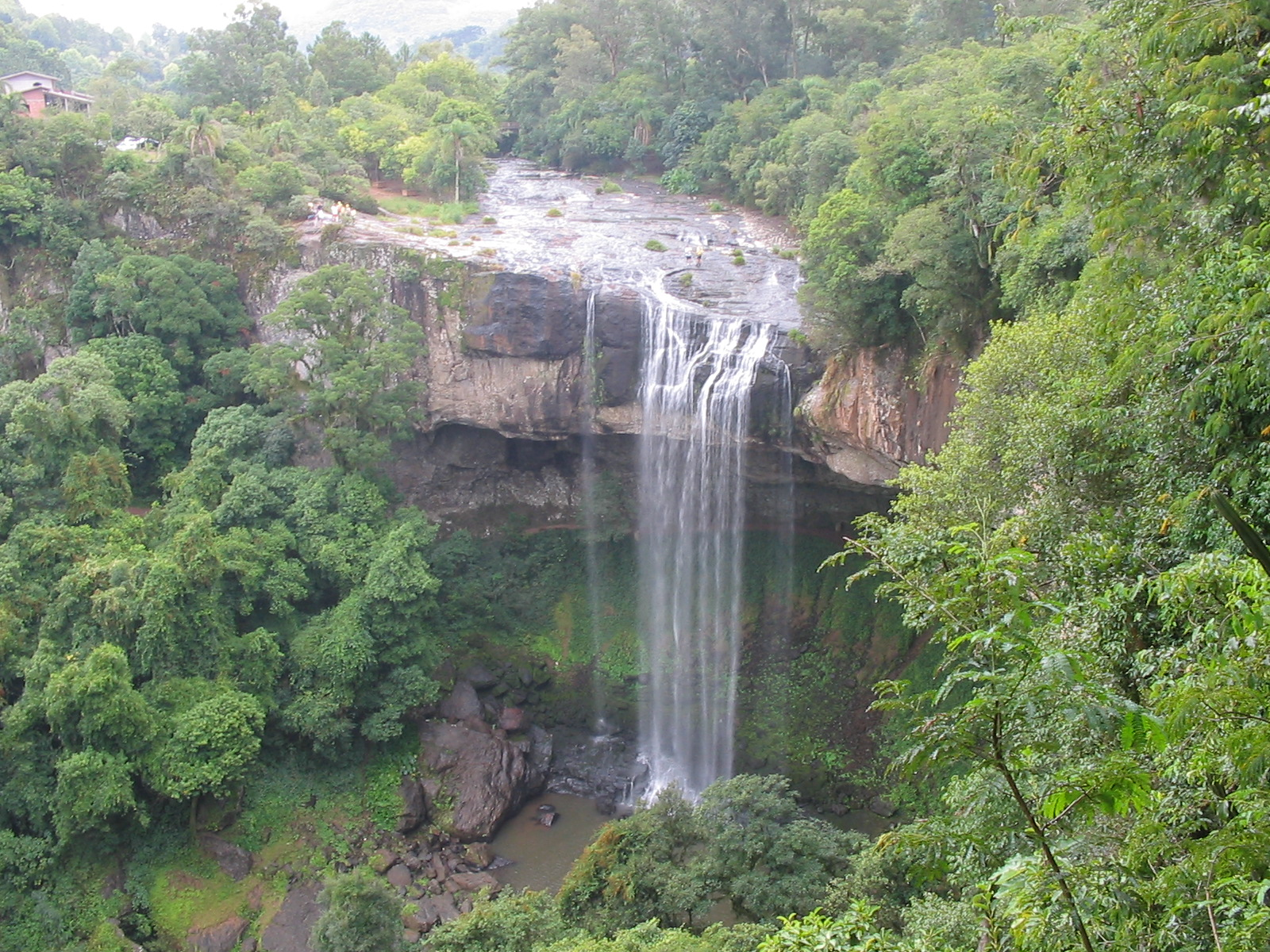 Salto Ventoso